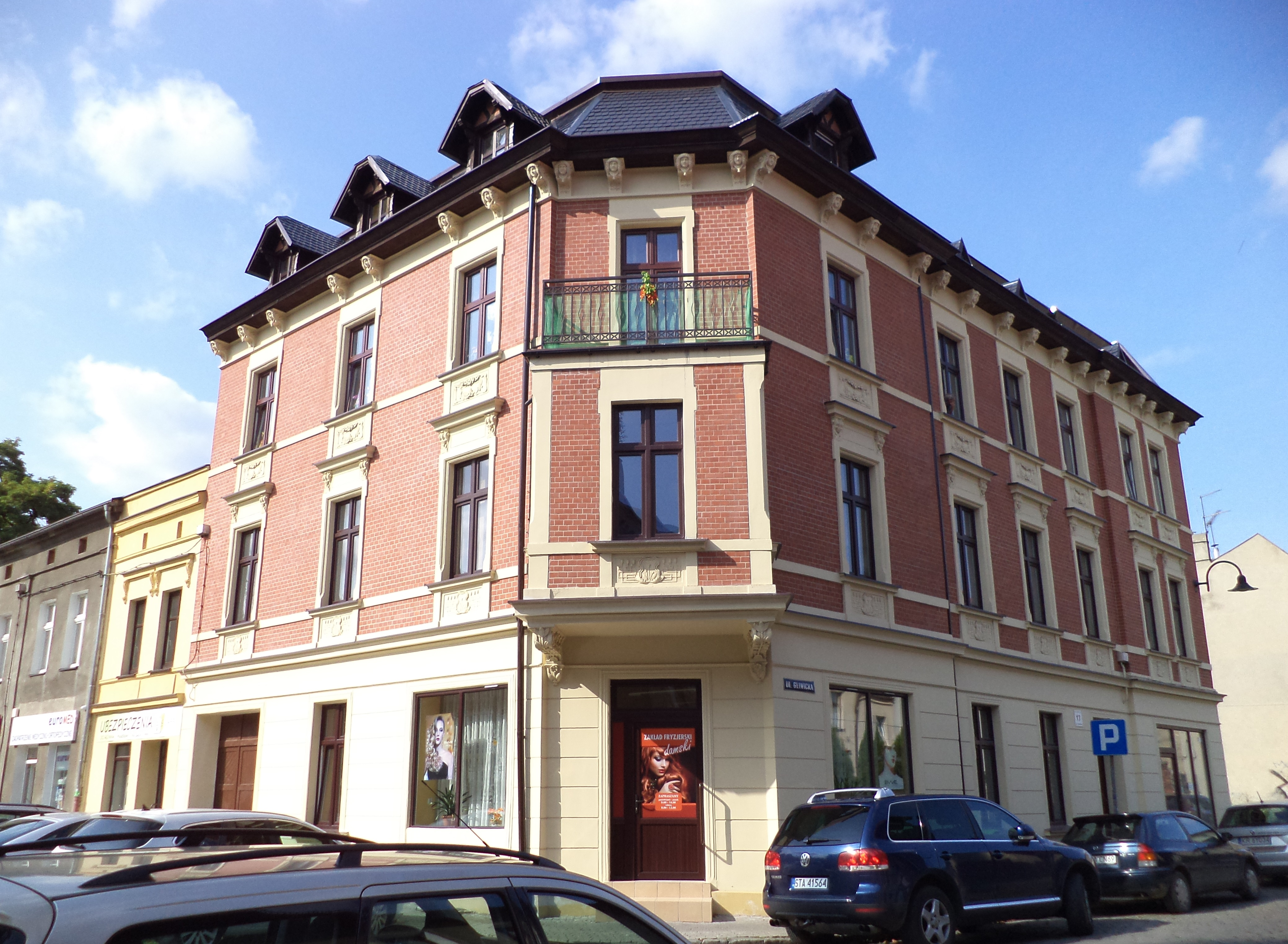 Kamienica z pocz. XX wieku przy ul. Gliwickiej 17 w Tarnowskich Górach (róg placu Gwarków)